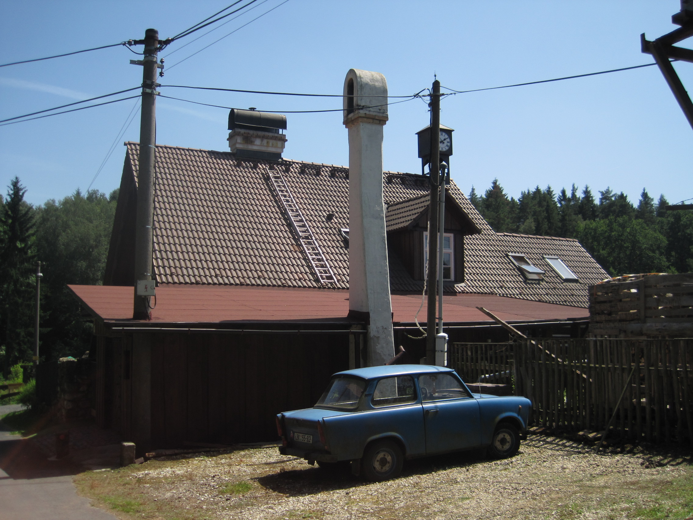 Saň - hostinec čp. 1